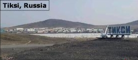 Tiksi, Siberia